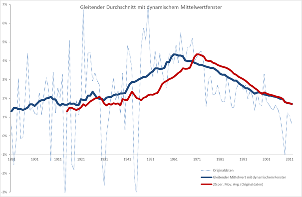 Die Abbildung zeigt den Vorteil eines dynamischen Fensters zur Berechnung des gleitenden Durchschnitts